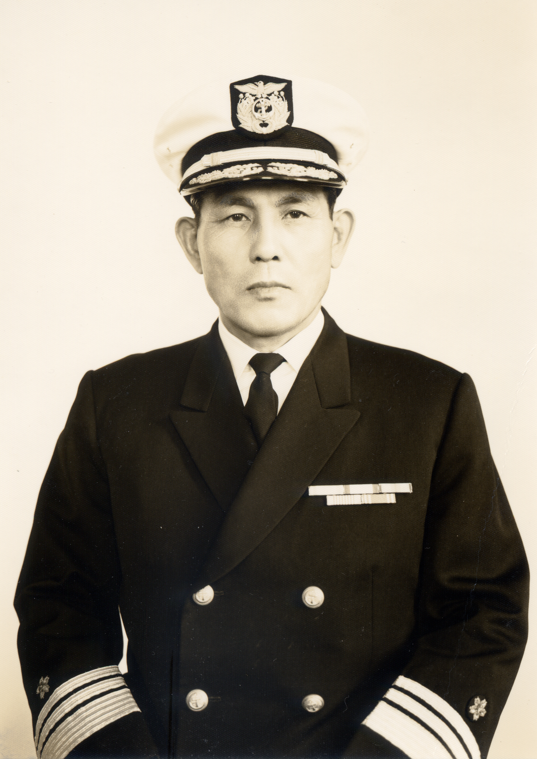 海将舞鶴地方総監・浜口玄吉